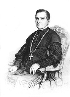 Fogarasy Mihály püspök